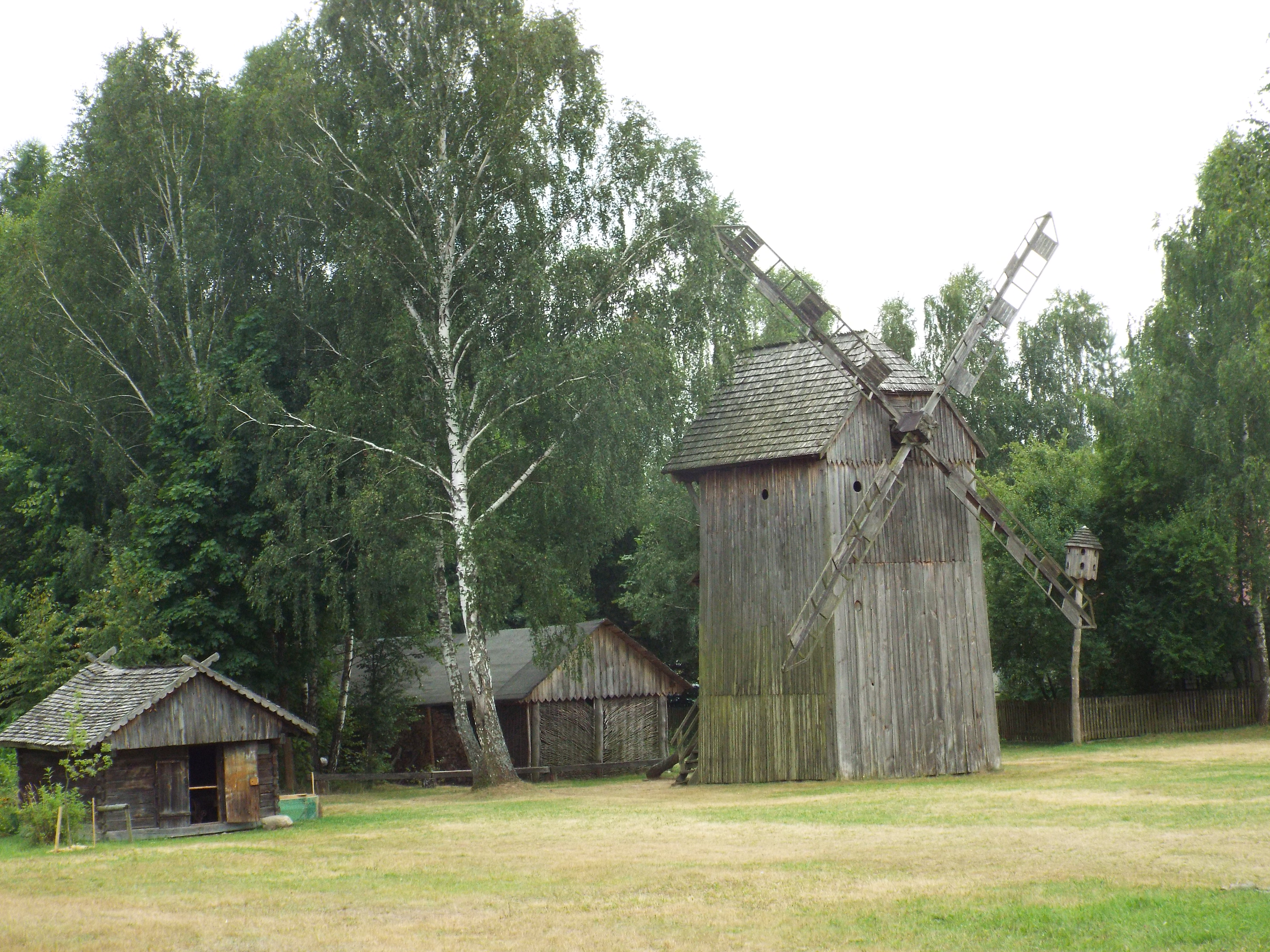 Hola - wiatrak-koźlak